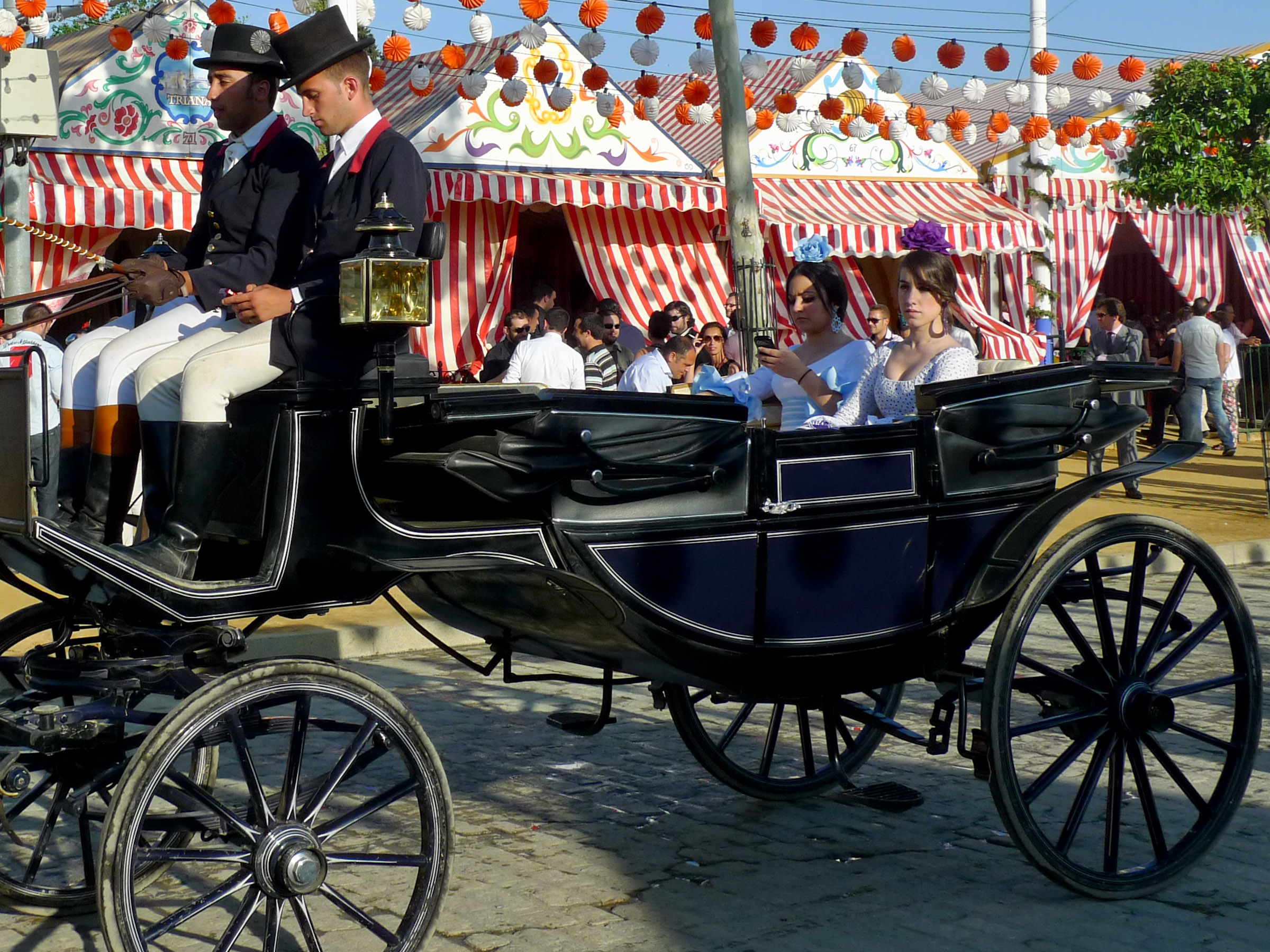 Vista del paseo de carruajes de la Feria de Abril de Sevilla